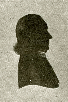 knipselportret van Jan Hendrik Gallée (1770-1847), burgemeester van Vorden